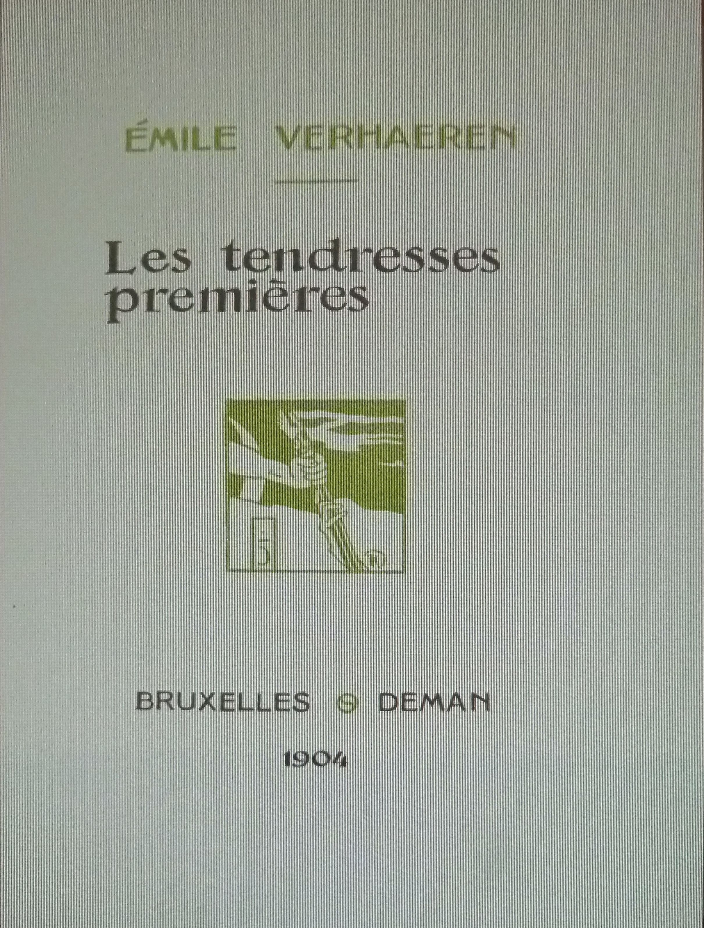 Emile Verhaeren - titelblad van gedichtenbundel "Toute la Flandre" "Les tendresses premières" (1904)